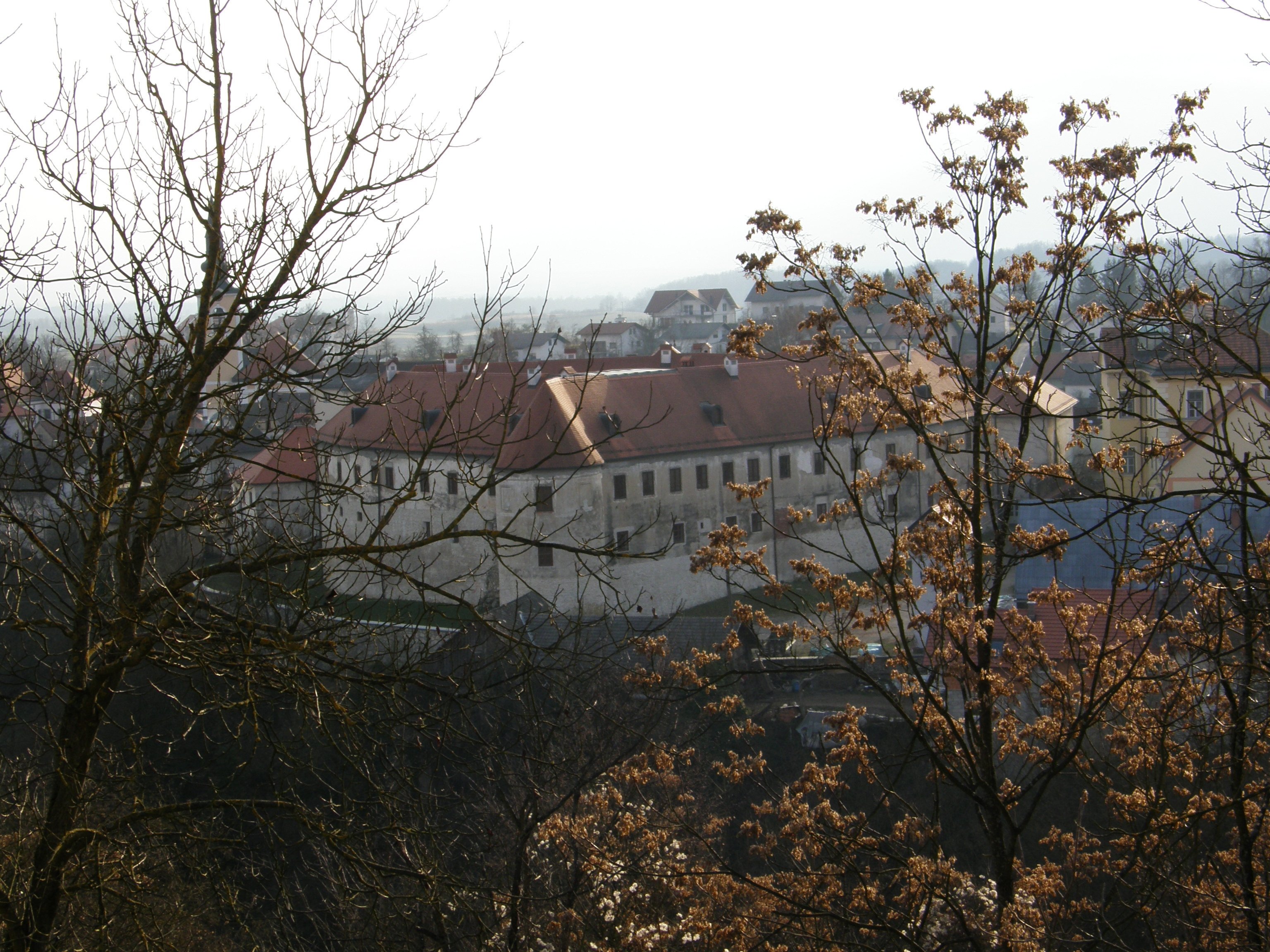 Metlika castle in Slovenia